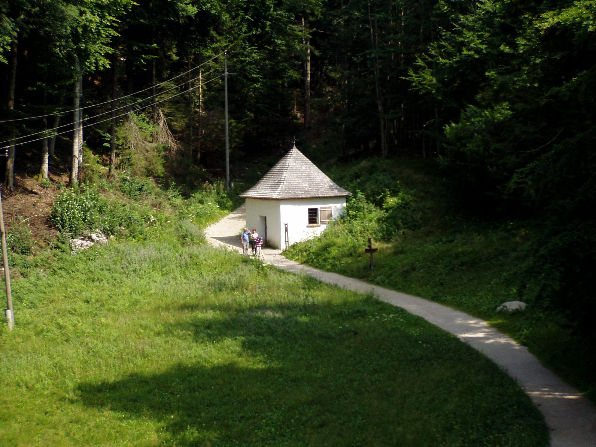 Brunnenkapelle nahe Falkensteinkirche bei St.Gilgen